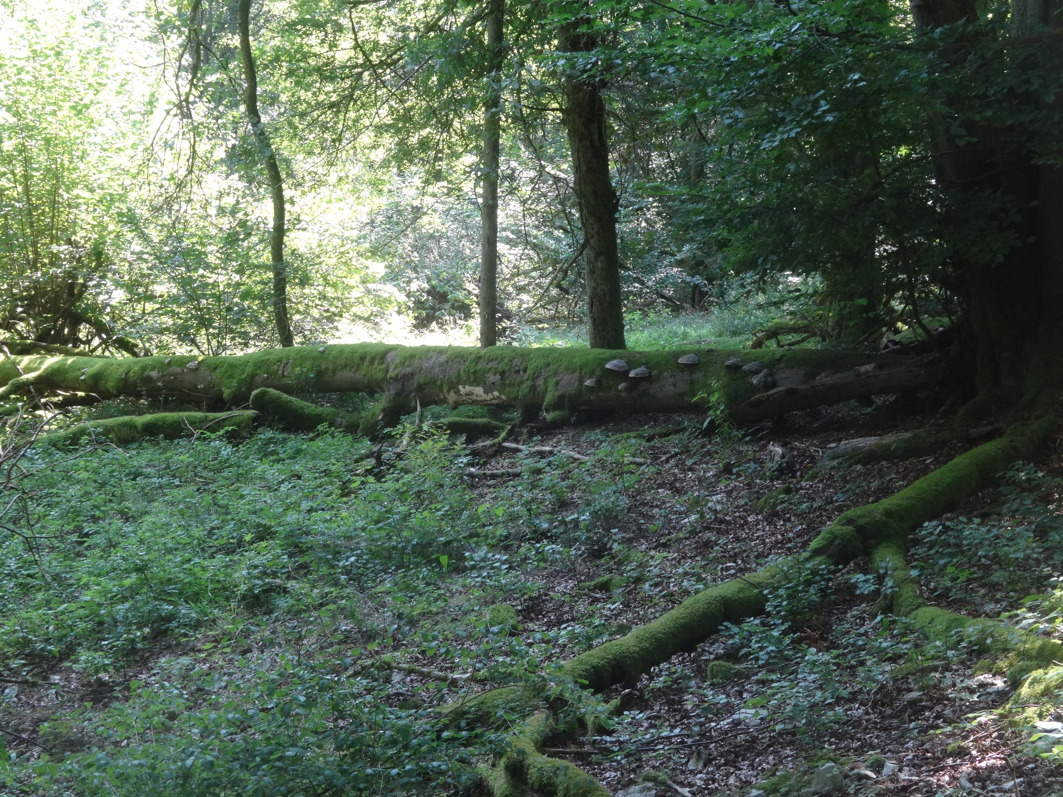 Totholz